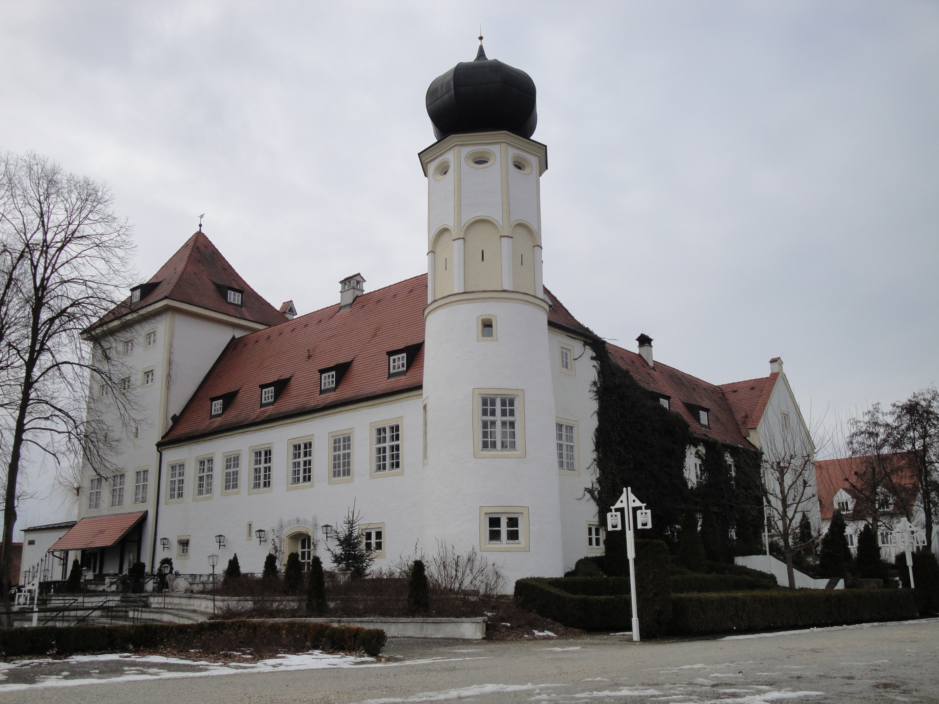 Schloß Neufahrn, 84088 Neufahrn in Niederbayern